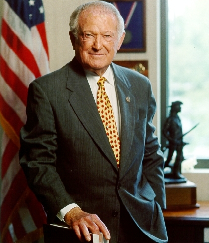 source [1]